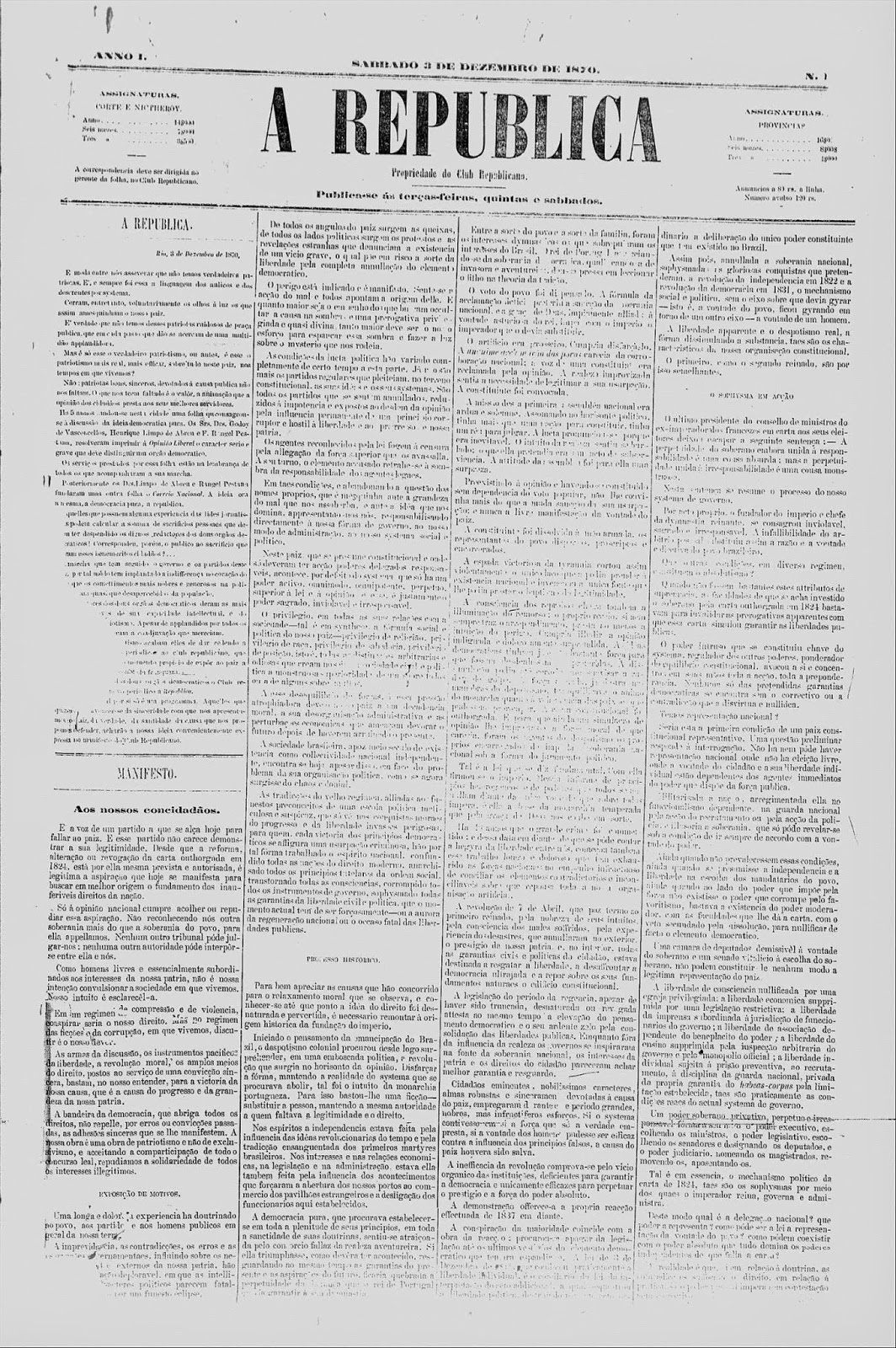 Capa do Jornal a República de 3 de dezembro de 1870, contendo o Manifesto Republicano.